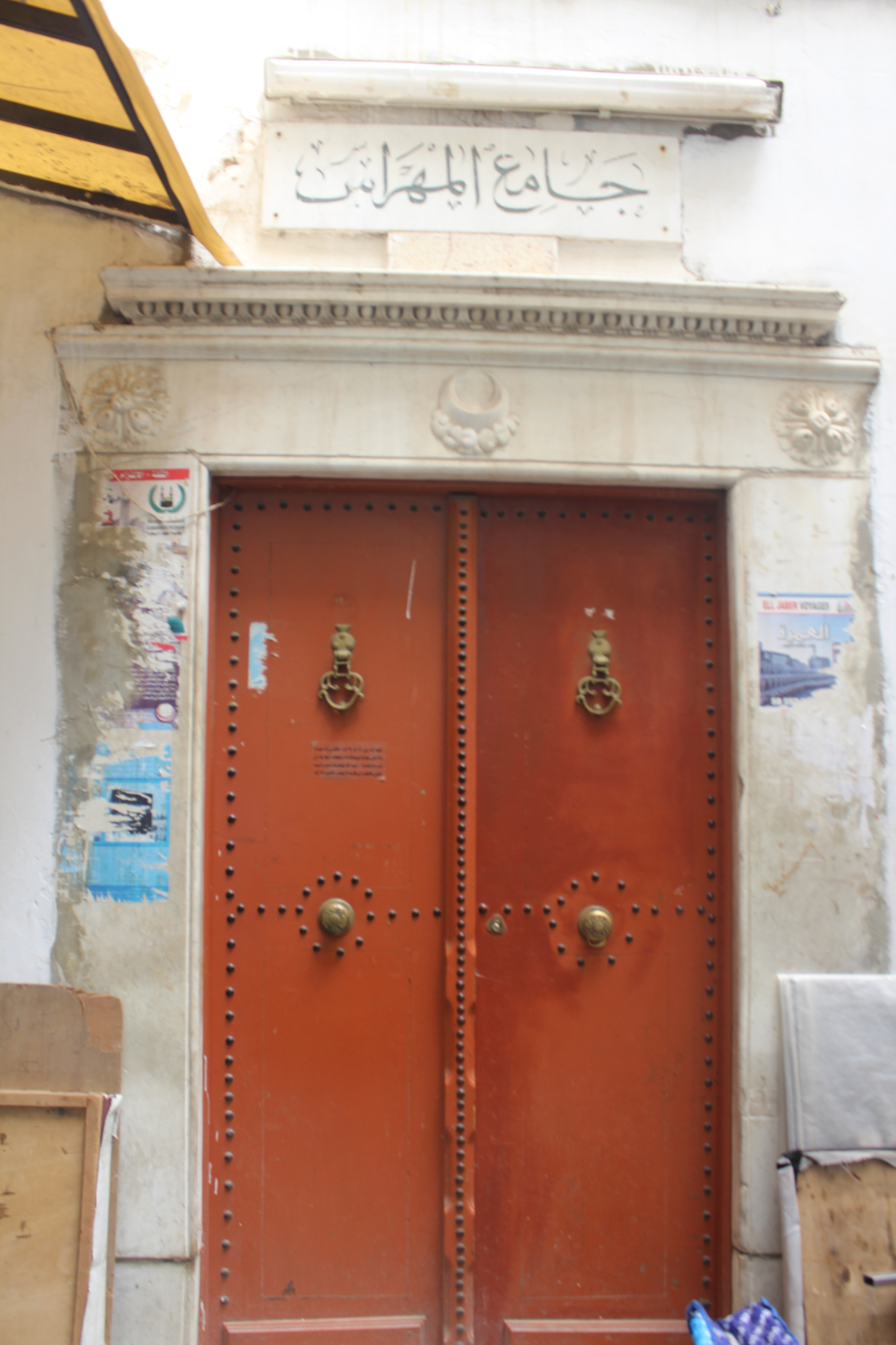 La médina de Tunis مدينة تونس العتيقة